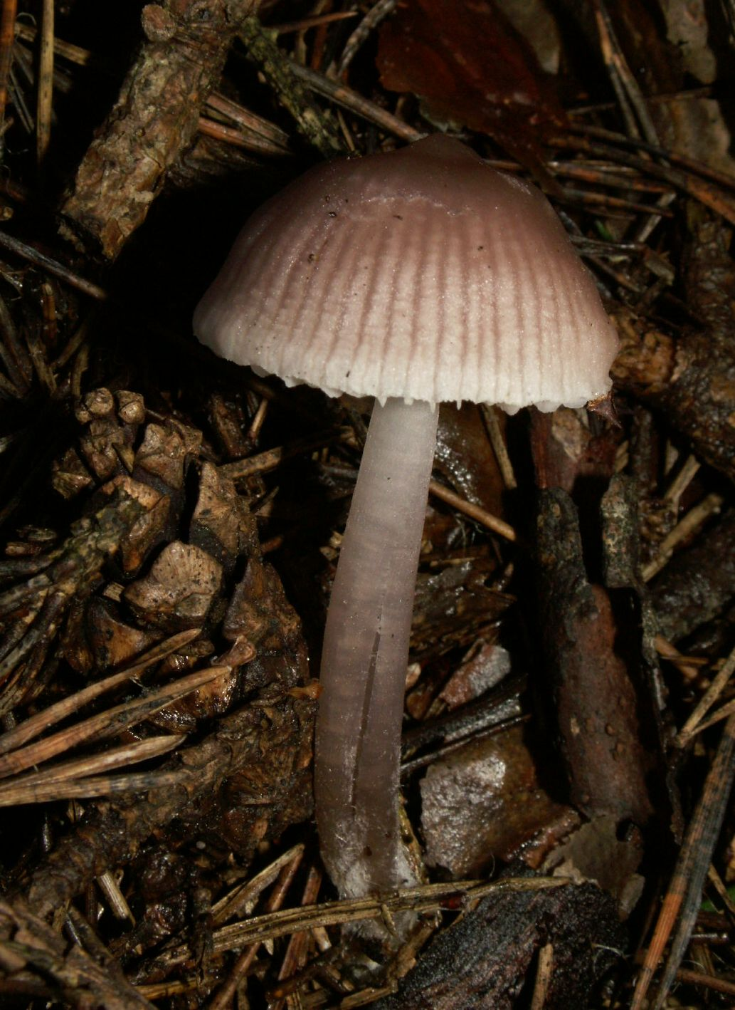 Mycena pura (vermutlich, Bestimmung nur anhand des Fotos), 6cm hoch, Waldrand